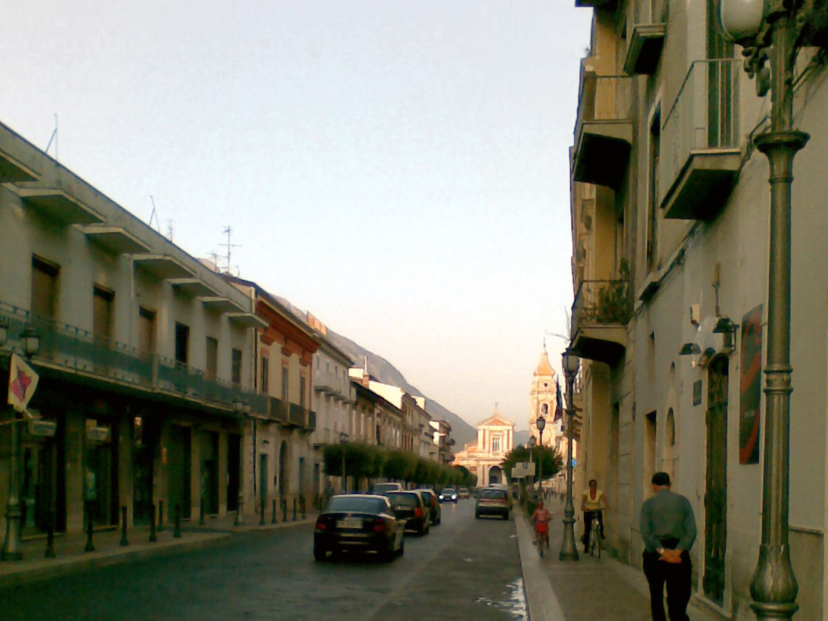 Corso Montella ad Airola (BN), Italia